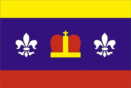 Vlajka obce Zdětín (okres Prostějov)